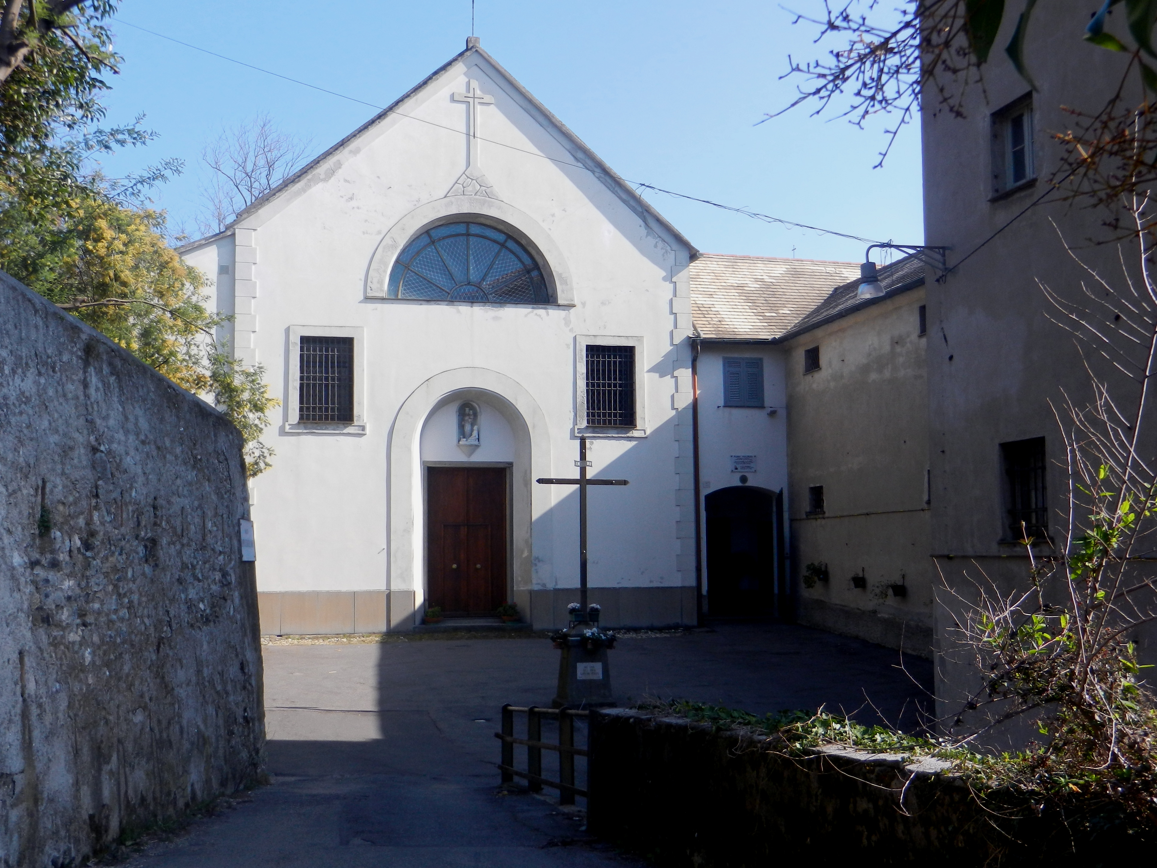 Genova, quartiere di Cornigliano, chiesa del convento dei cappuccini di Campi